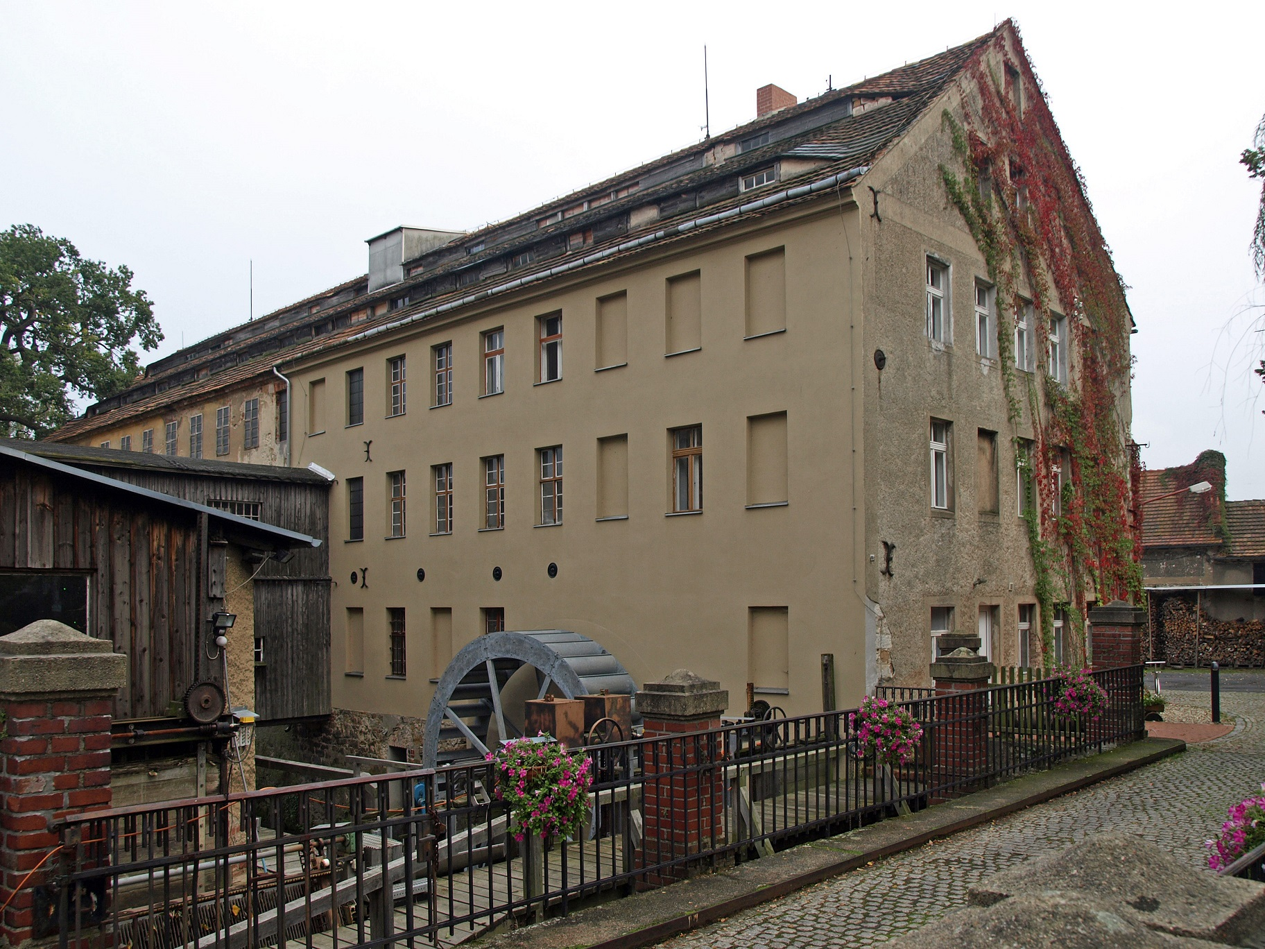 Pohl-Mühle in Ludwigsdorf bei Görlitz